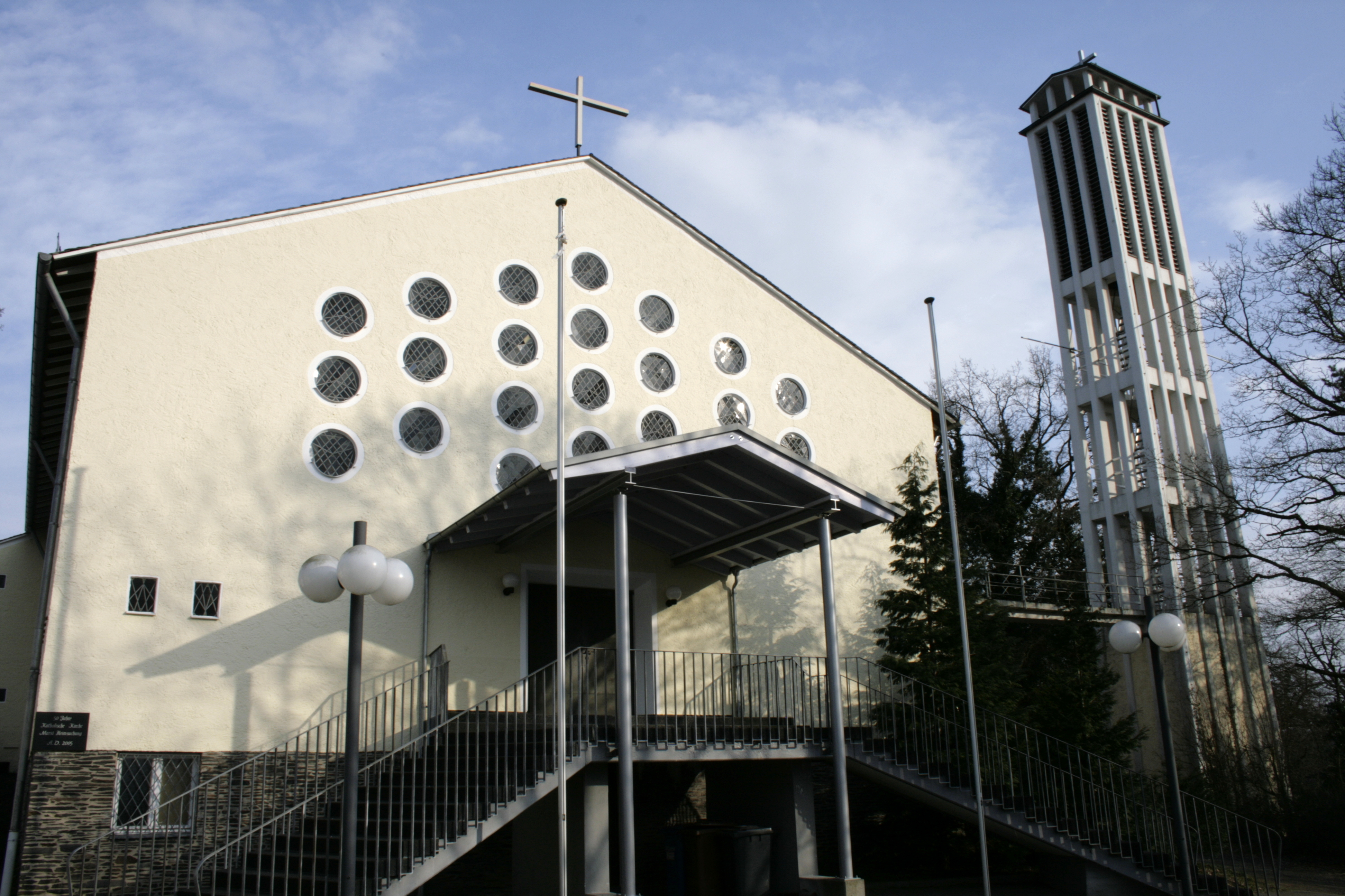 Katholische Kirche (Mariä Heimsuchung) in Runkel, Deutschland